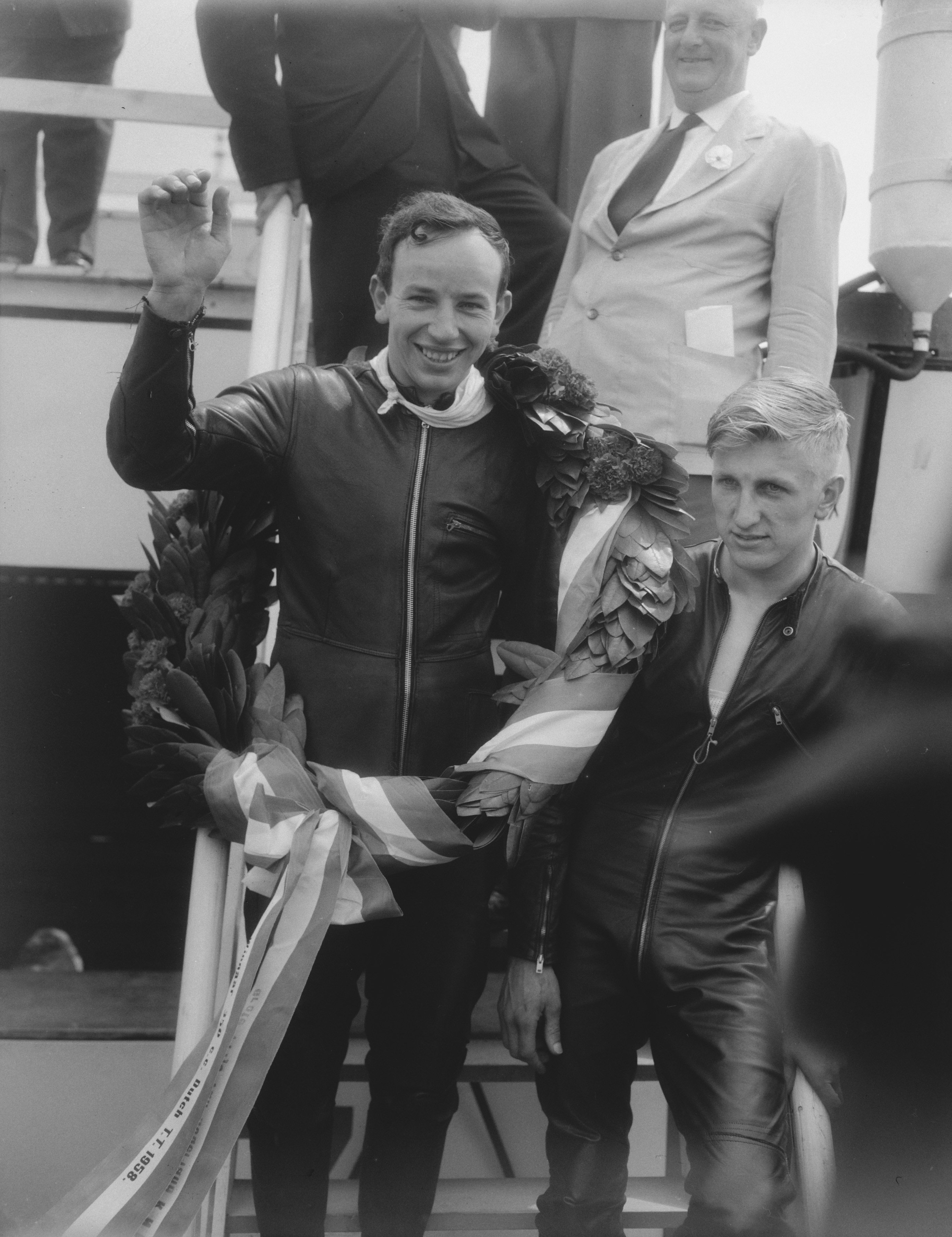 Collectie / Archief : Fotocollectie Anefo Reportage / Serie : TT Assen 1958 Beschrijving : TT races te Assen, huldiging van John Surtees (winnaar 500cc) Annotatie : Rechts Anton Elbersen (als beste Nederlander op de 8e plaat)?) Datum : 28 juni 1958 Locatie : Assen Trefwoorden : motorsport, motorsport, sport Persoonsnaam : Elbersen, Anton, Surtees, John Fotograaf : Pot, Harry / Anefo Auteursrechthebbende : Nationaal Archief Materiaalsoort : Negatief (zwart/wit) Nummer archiefinventaris : bekijk toegang 2.24.01.04 Bestanddeelnummer : 909-6724 Reacties Geplaatst door Anoniem op 16 februari 2017 - 20:57. John Surtees (Gb), winnaar 350cc en John Hartle (Gb), 2e in de 350cc klasse, gaan de trap af na de huldiging.